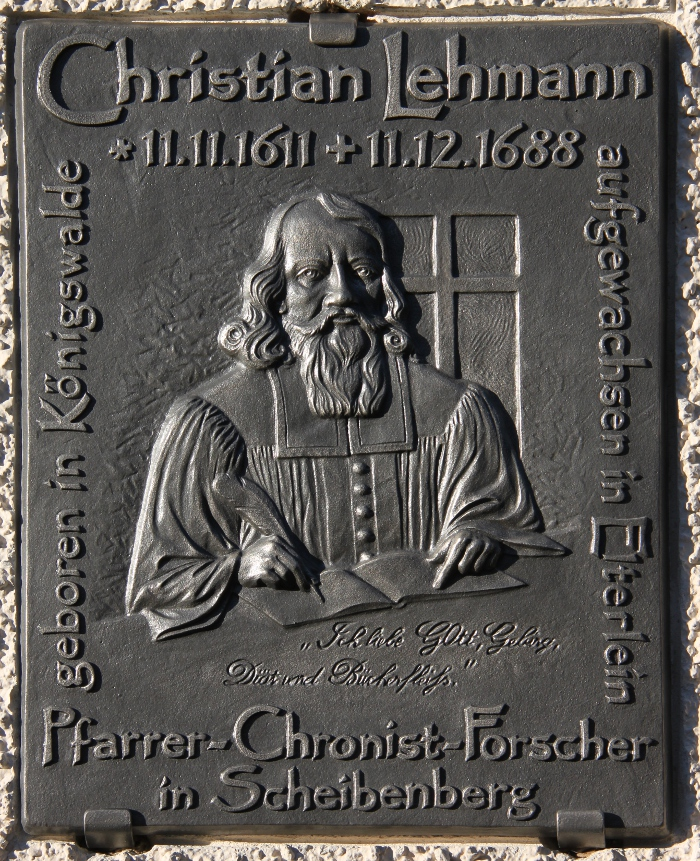 Gedenktafel anlässlich des 400. Geburtstages von Christian Lehmann, evangelischer Pfarrer und Erzgebirgschronist. Entwurf von Friedhelm Schelter aus Königswalde. Eisenguss. Insgesamt drei Exemplare wurden im November 2011 in Königswalde, Elterlein und Scheibenberg angebracht. Im Bild das Exemplar am Pfarrhaus Königswalde.